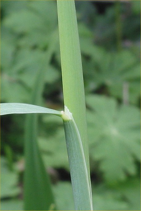 ligula of Alopecurus pratensis